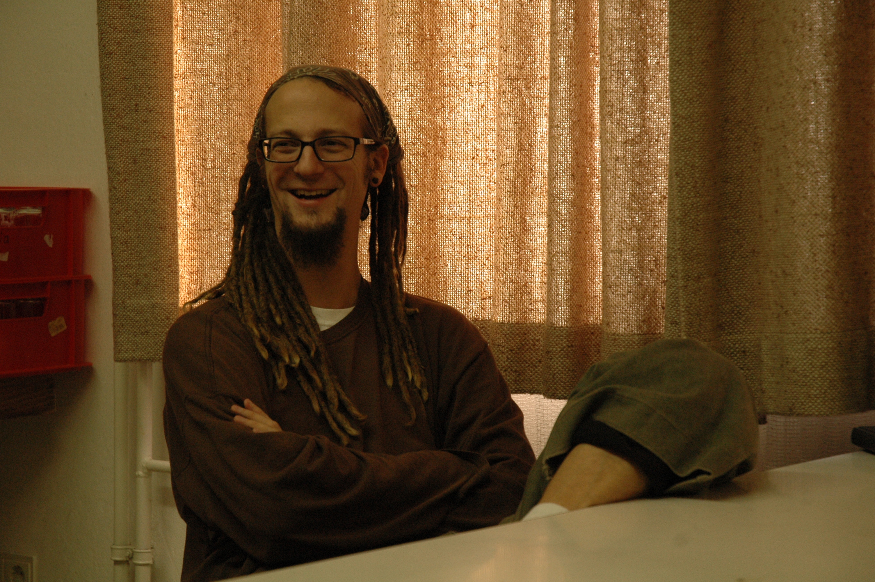 Shane Claiborne bei einem Interview mit dem Christlichen Medienmagazin pro im Jahr 2009